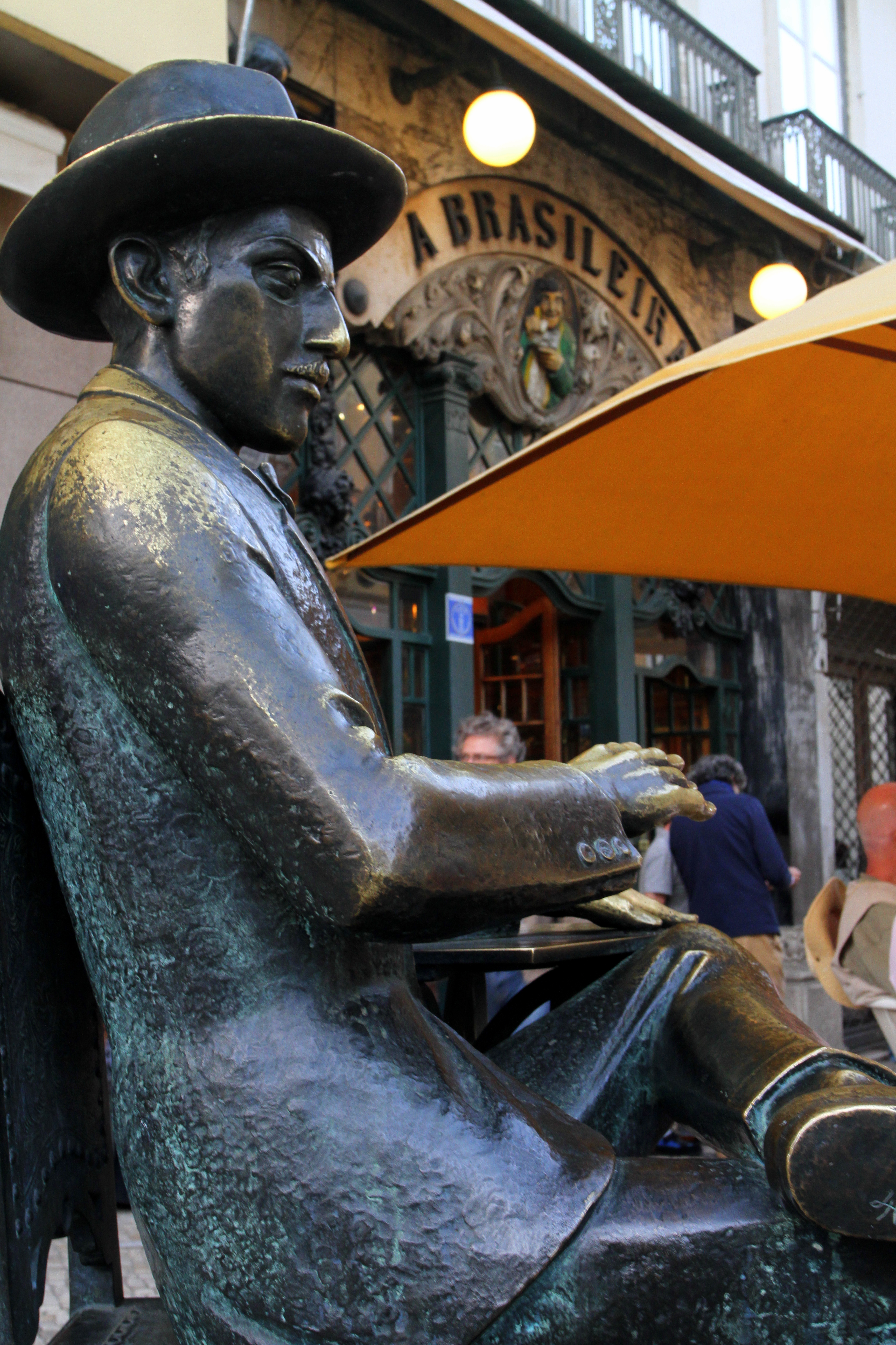 A Brasileira . Lisboa This file was uploaded for Wiki Loves Monuments in Portugal with the unique identifier 74475.